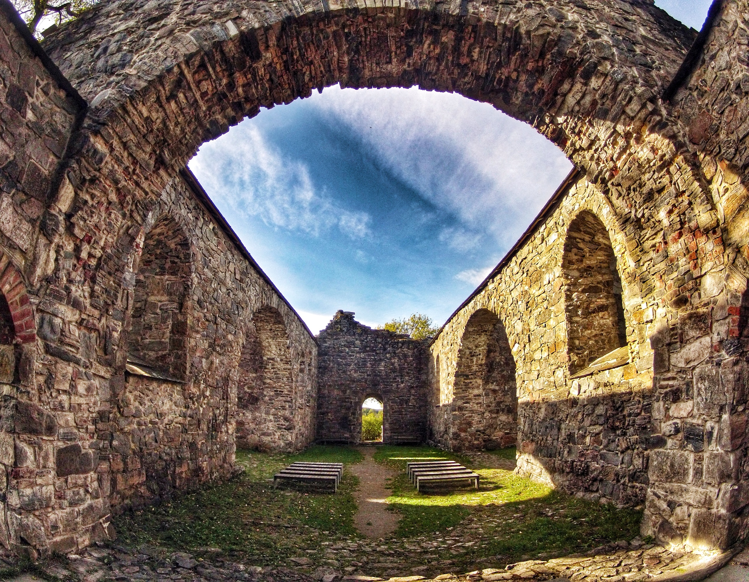 Nes kirkeruin, Akershus